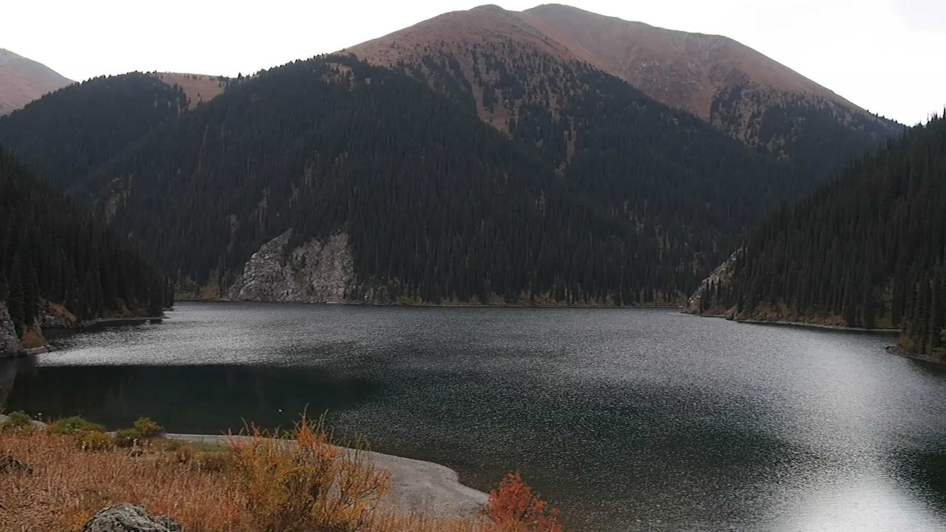 Der zweite (mittlere) Kolsai-See in Kasachstan